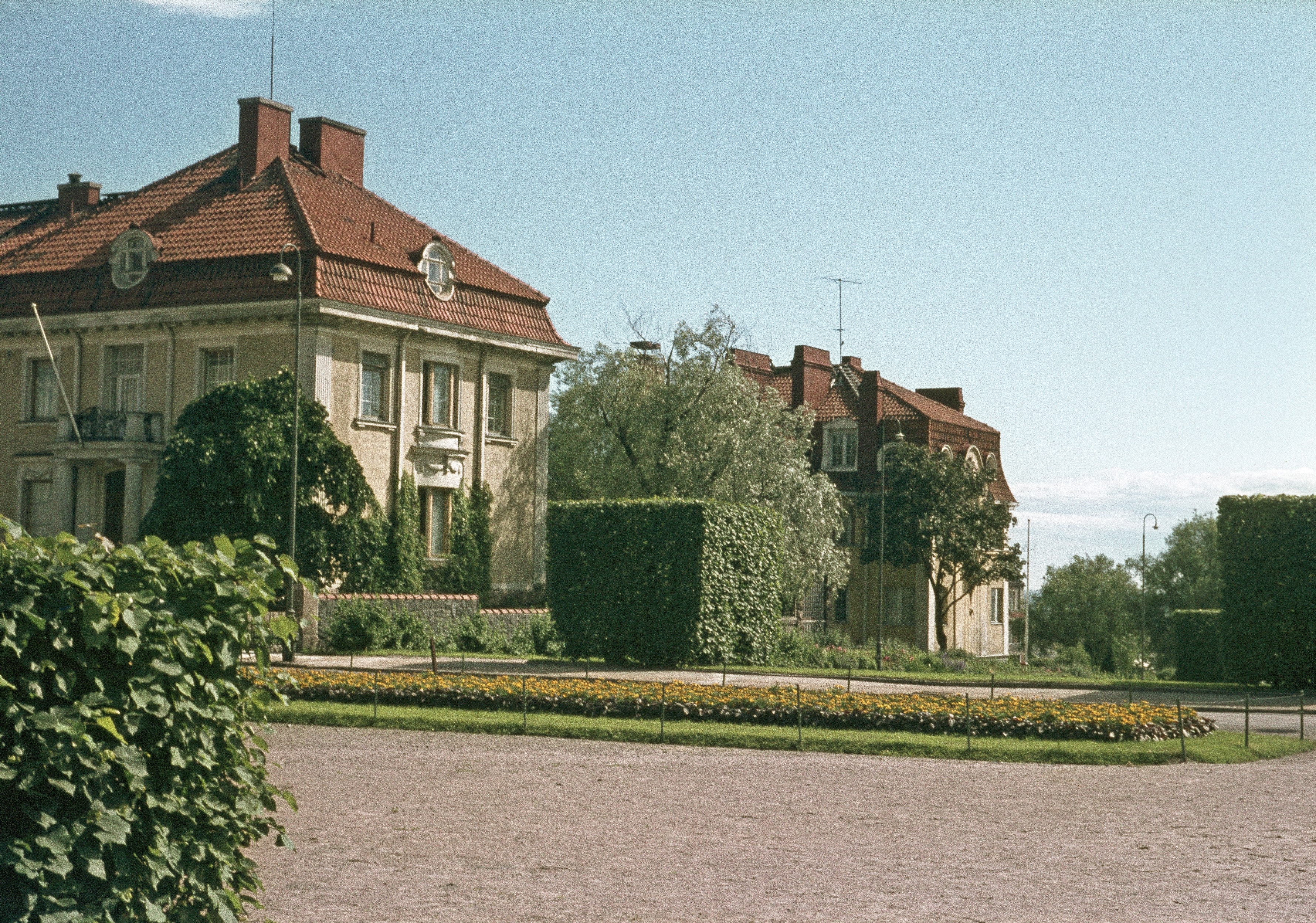 Engelinaukio 8. Taustalla on Armfeltintie 6; dia, filmi, väri